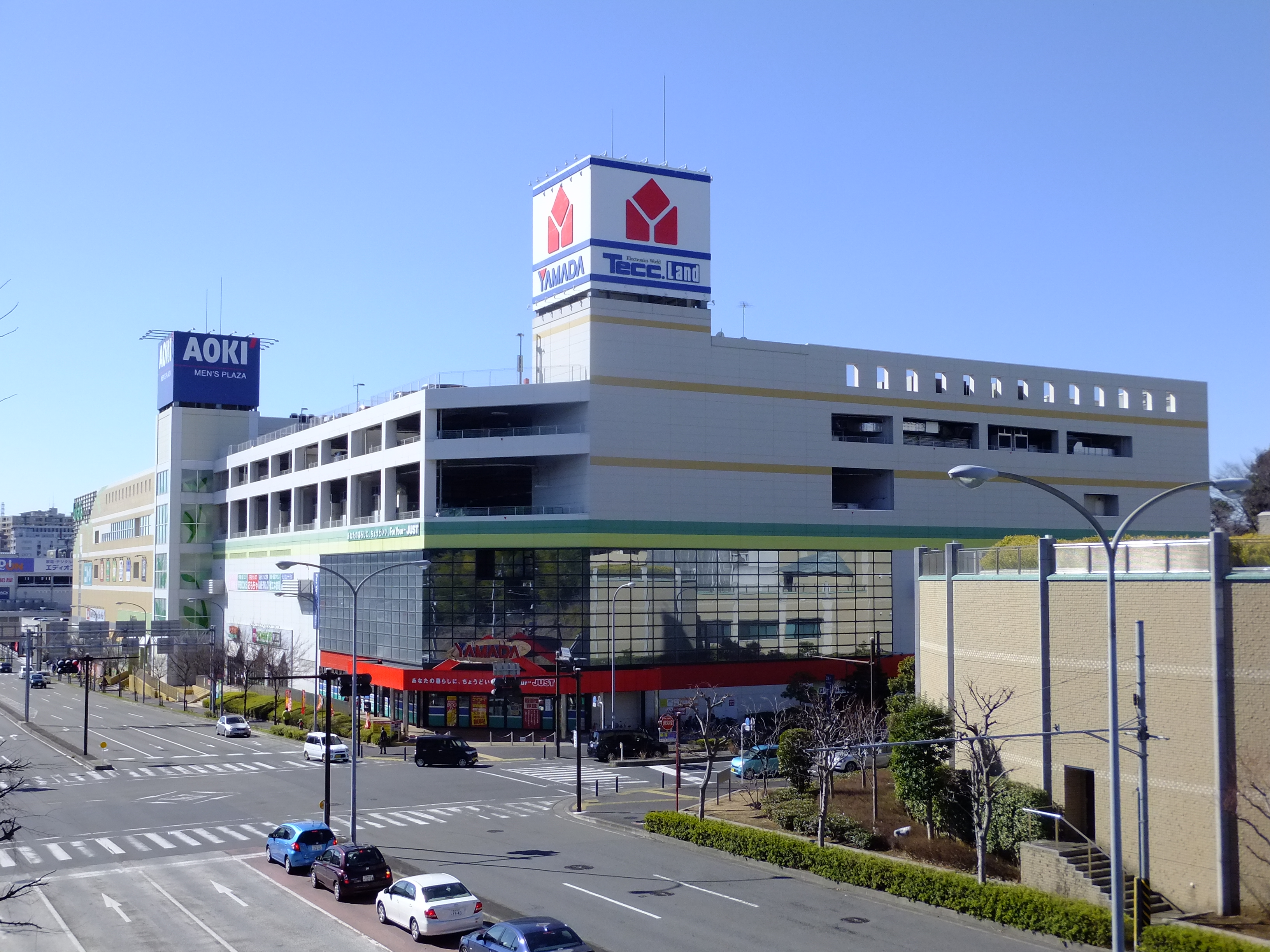 港北ニュータウンの大型商業施設・ルララこうほく（LuRaRa KOHOKU）